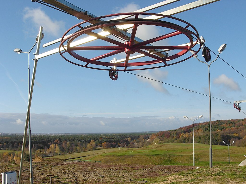 Na Górze Myślęcińskiej